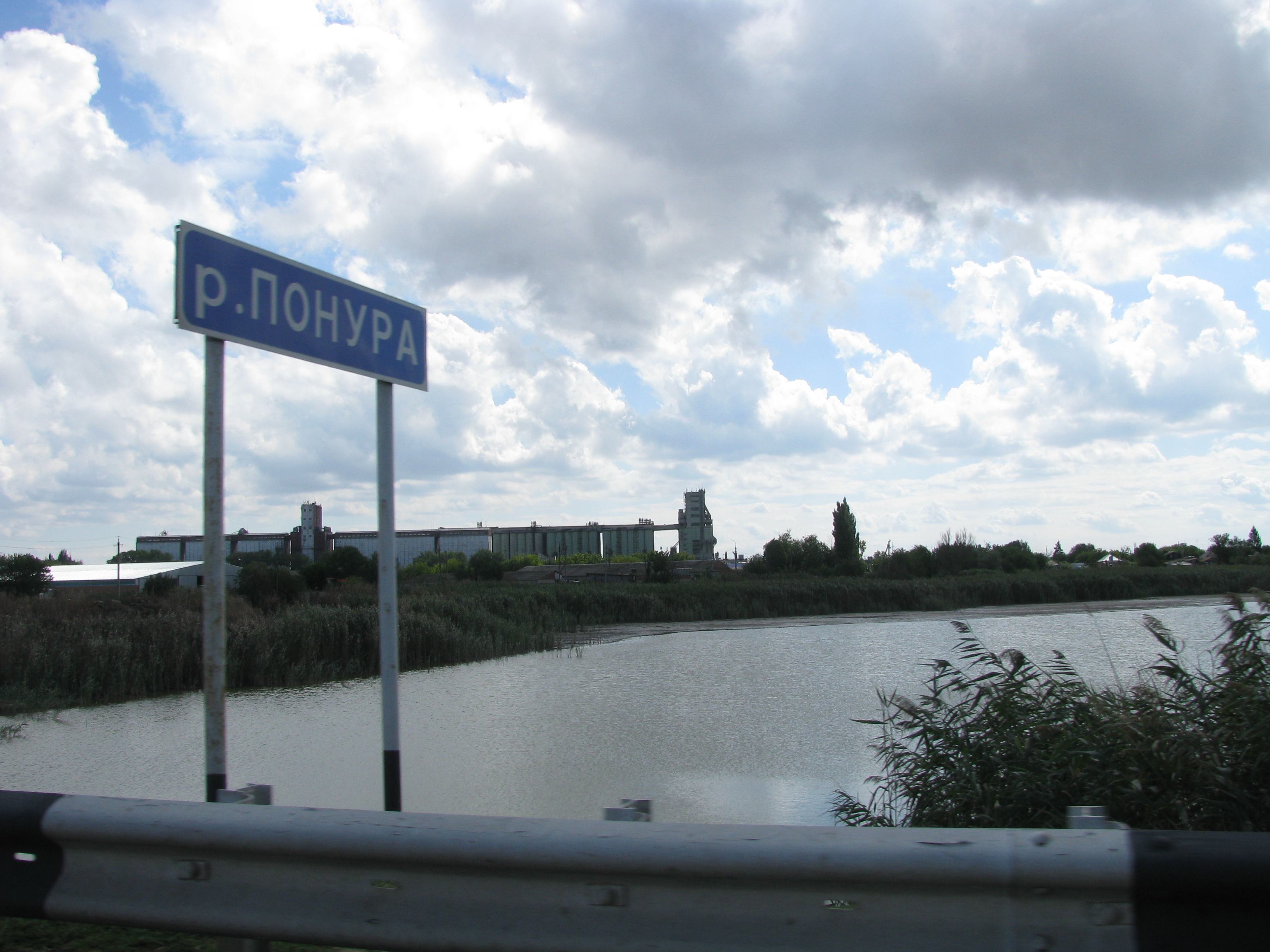 Река Понура, Краснодарский край